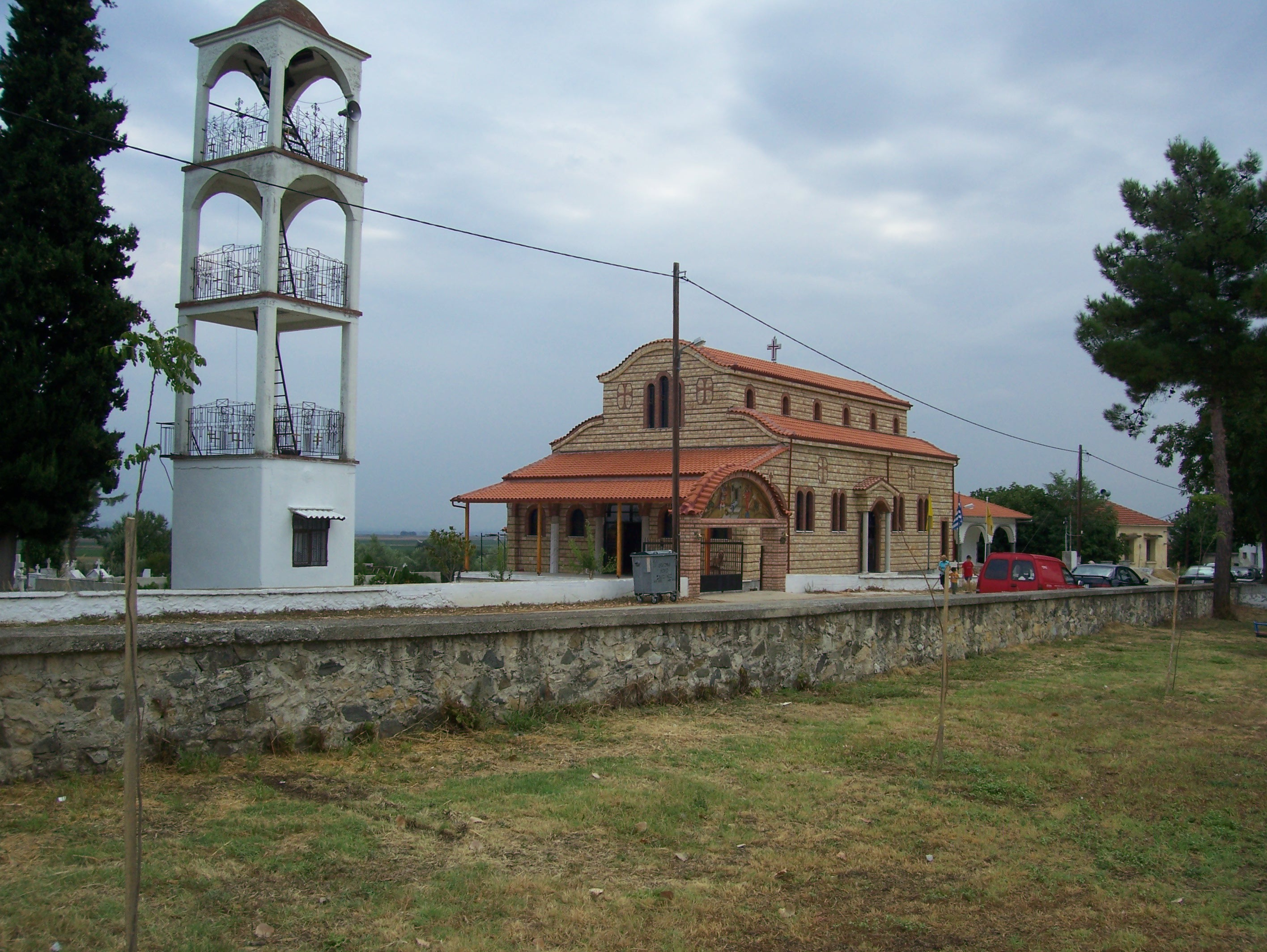 Dorfkirche Lefkotopos